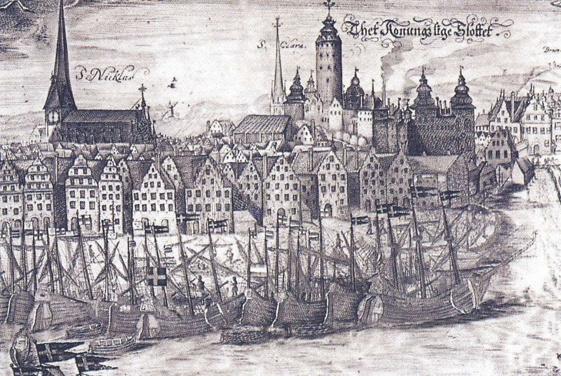 Gravyr (utsnitt) av Wolfgang Hartmann; Skeppsbron från Skeppsholmen, Stockholm